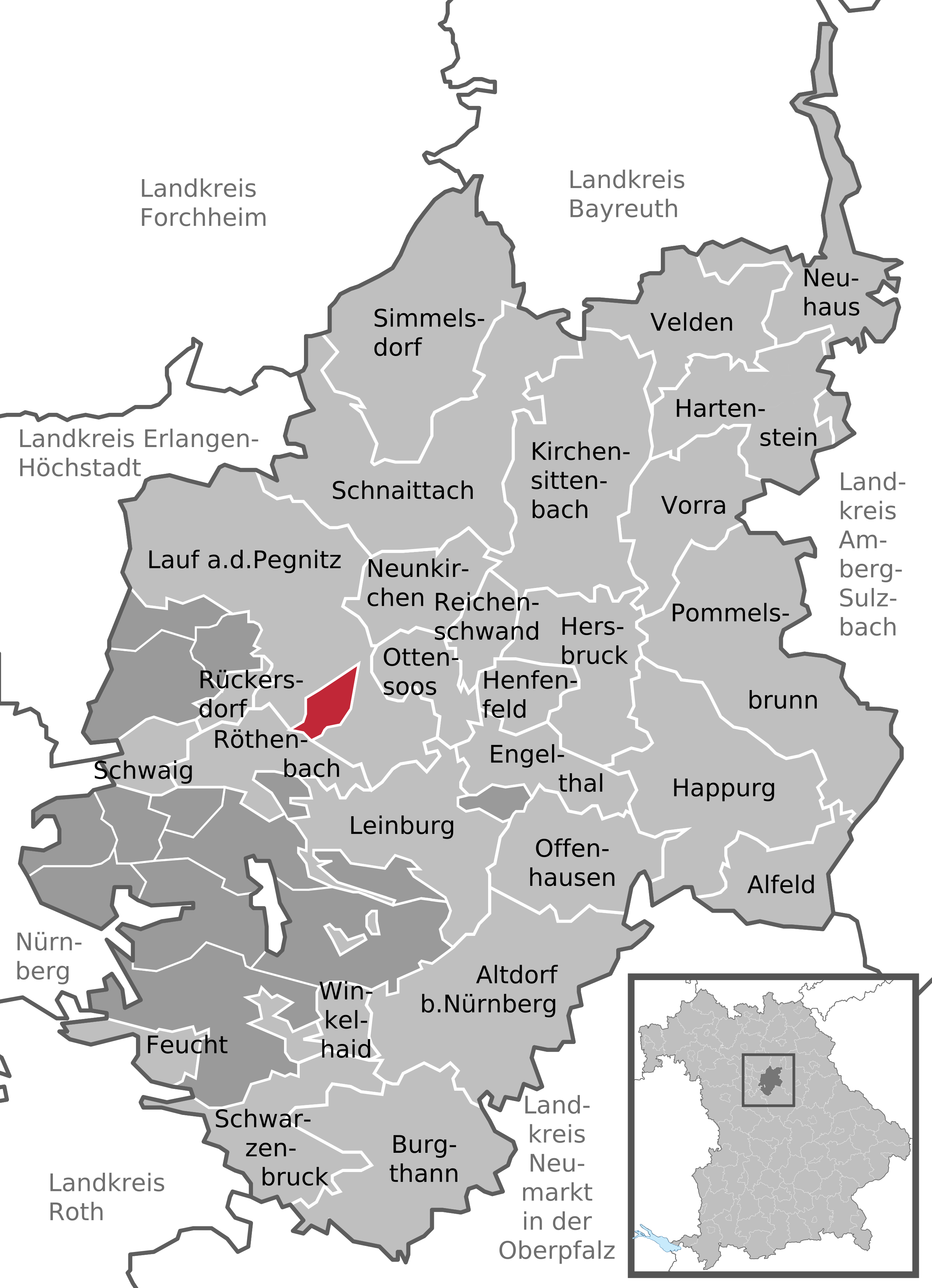 Positionskarte des gemeindefreien Gebietes Schönberg